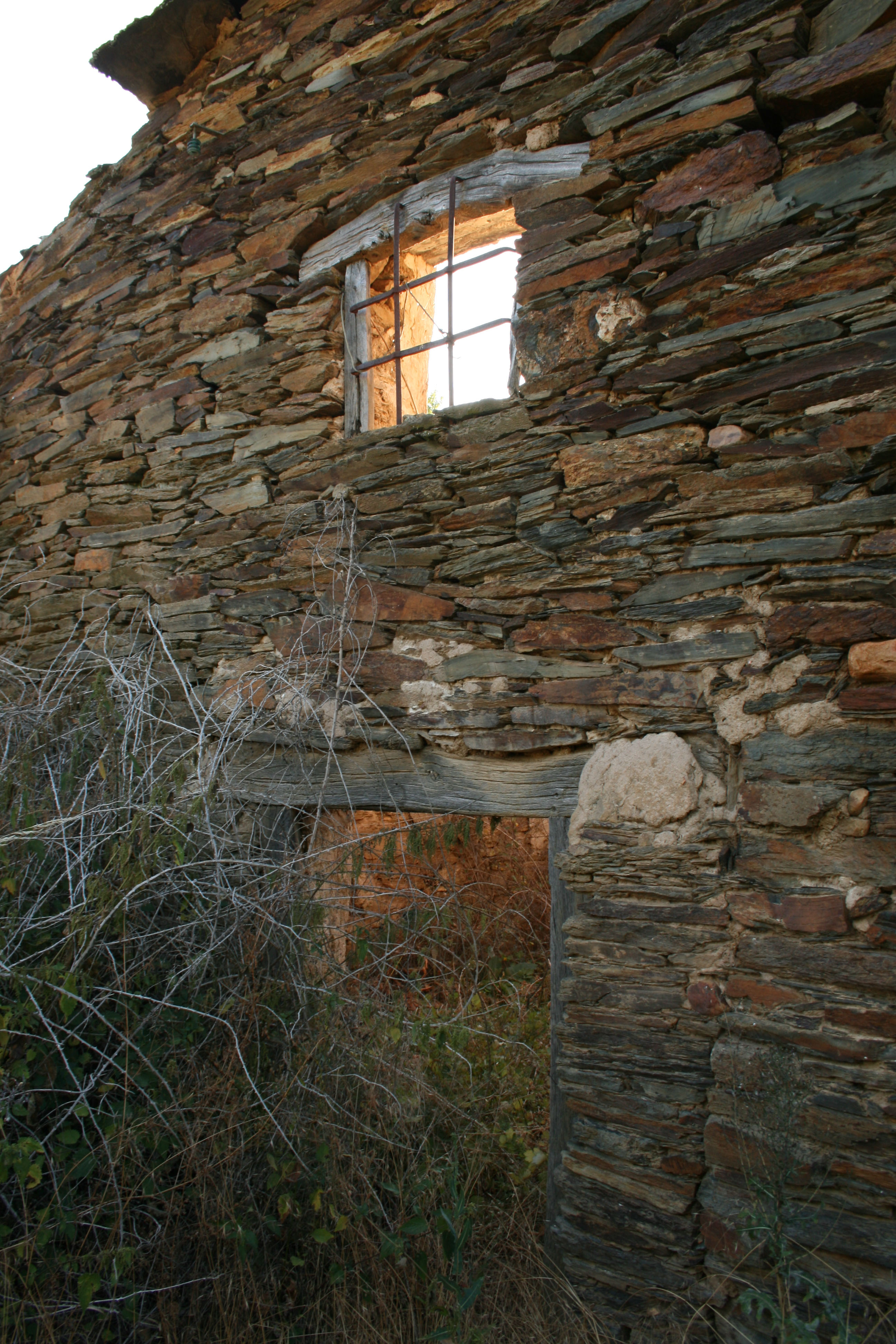 Casa con pizarra frente a la era en Palazuelo de las Cuevas (Aliste - Zamora)